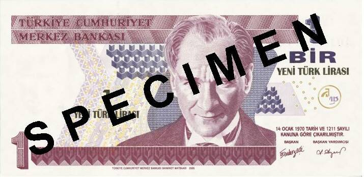 1 YTL ön